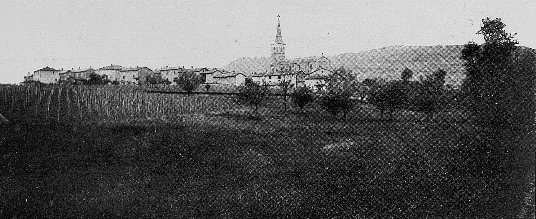 Dictionnaire illustré des communes du département du Rhône. Tome 1 / par MM. E. de Rolland et D. Clouzet.